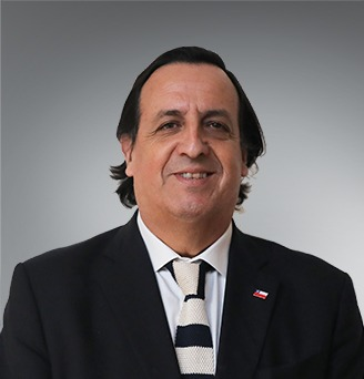 Retrato oficial de Víctor Pérez Varela como Ministro del Interior y Seguridad Pública de Chile, 2020.